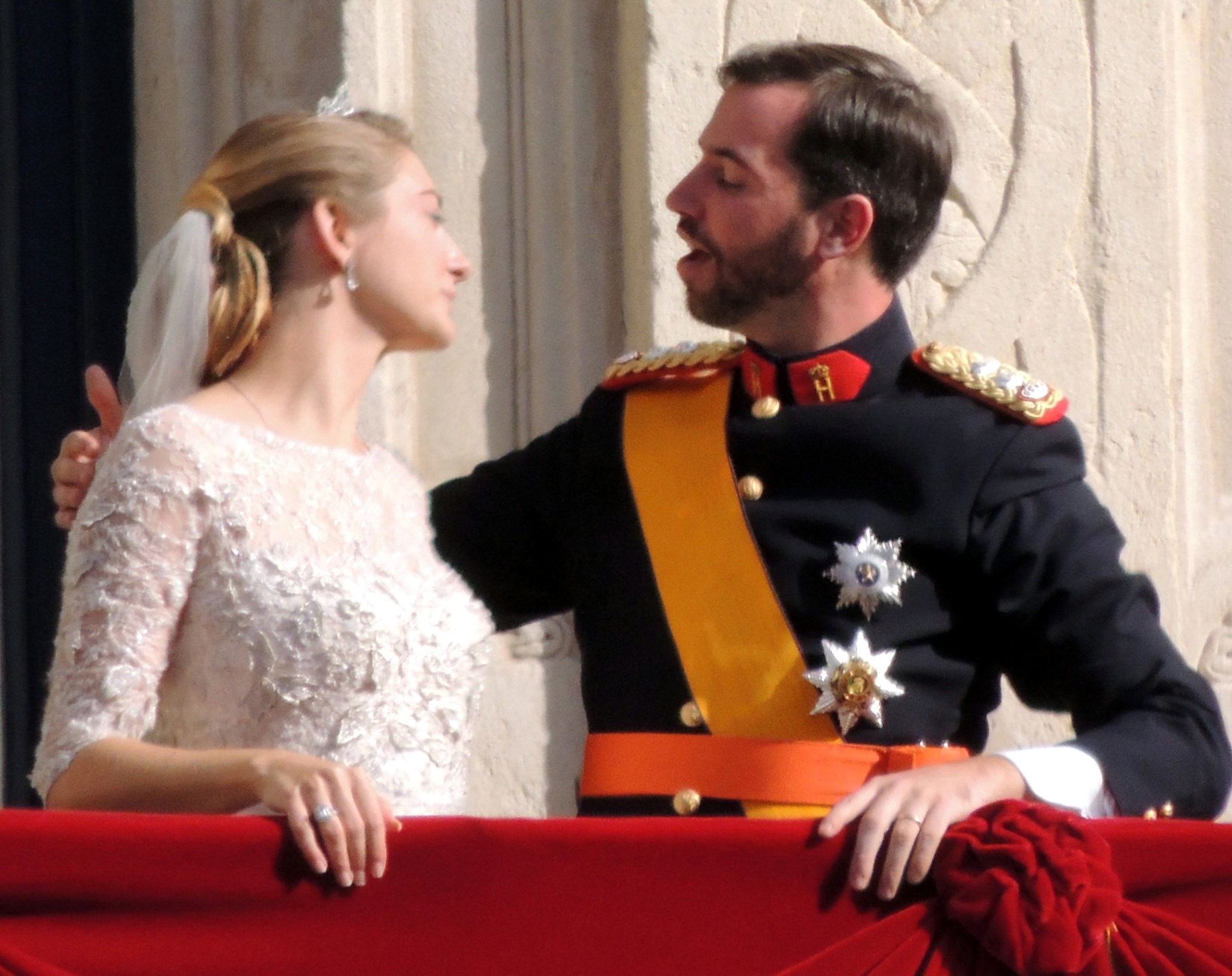 Den Ierfgroussherzog Guillaume an d'Stéphanie vu Lëtzebuerg, Prënzekanner déi sech fonnt hunn.